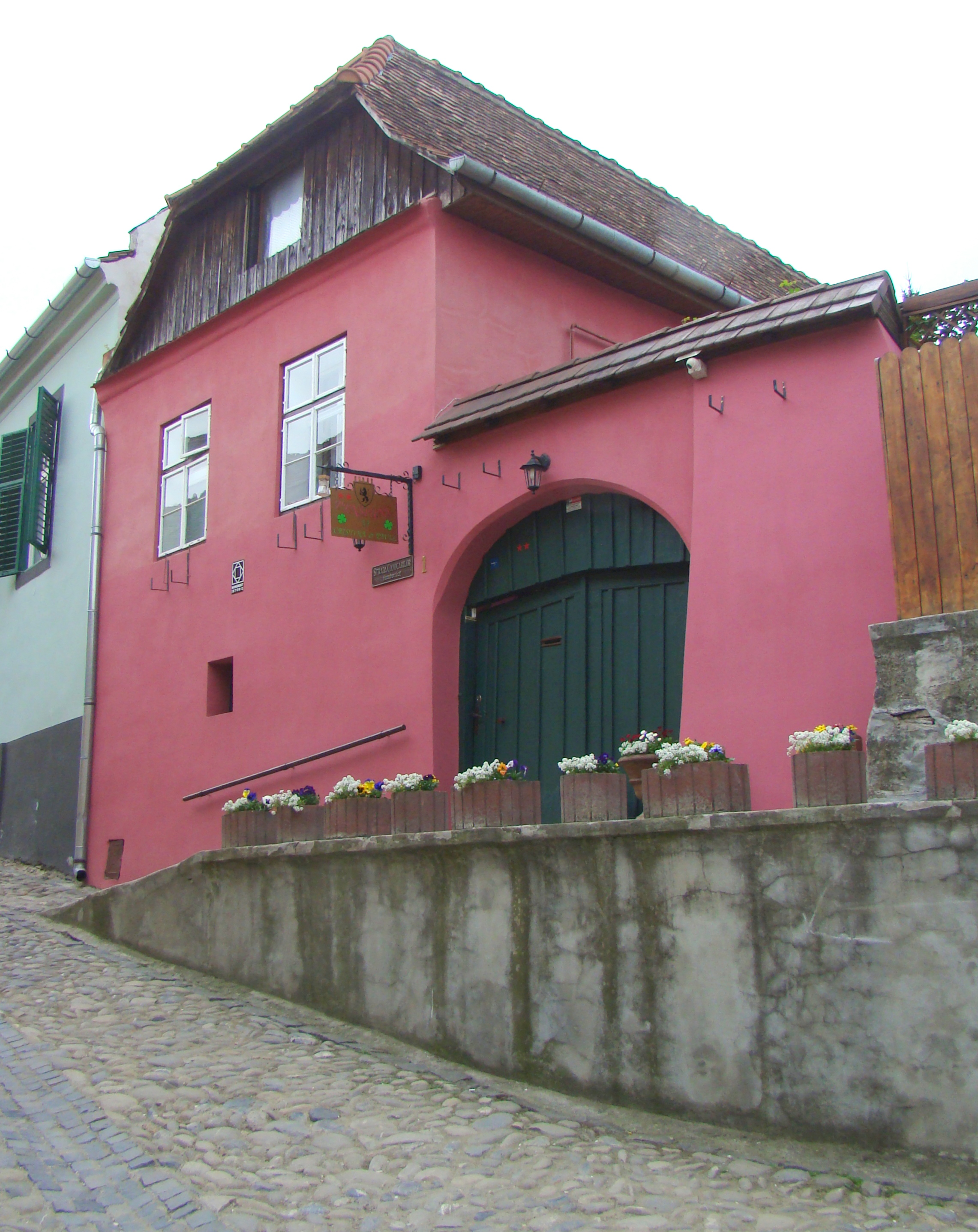 Casa Leonhardt, municipiul Sighișoara, str. Cojocarilor 1 sec. XVIII - XX